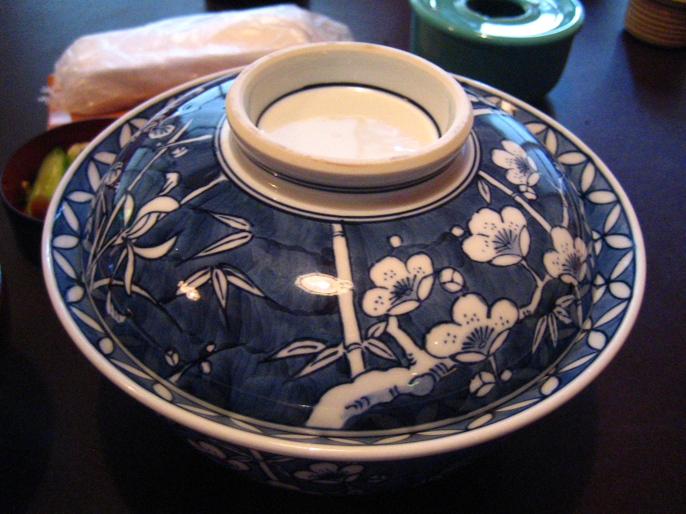 at "Miyagawa Honten", a traditional unagi restaurant in Tsukiji, Tokyo.IMG_2278.JPG